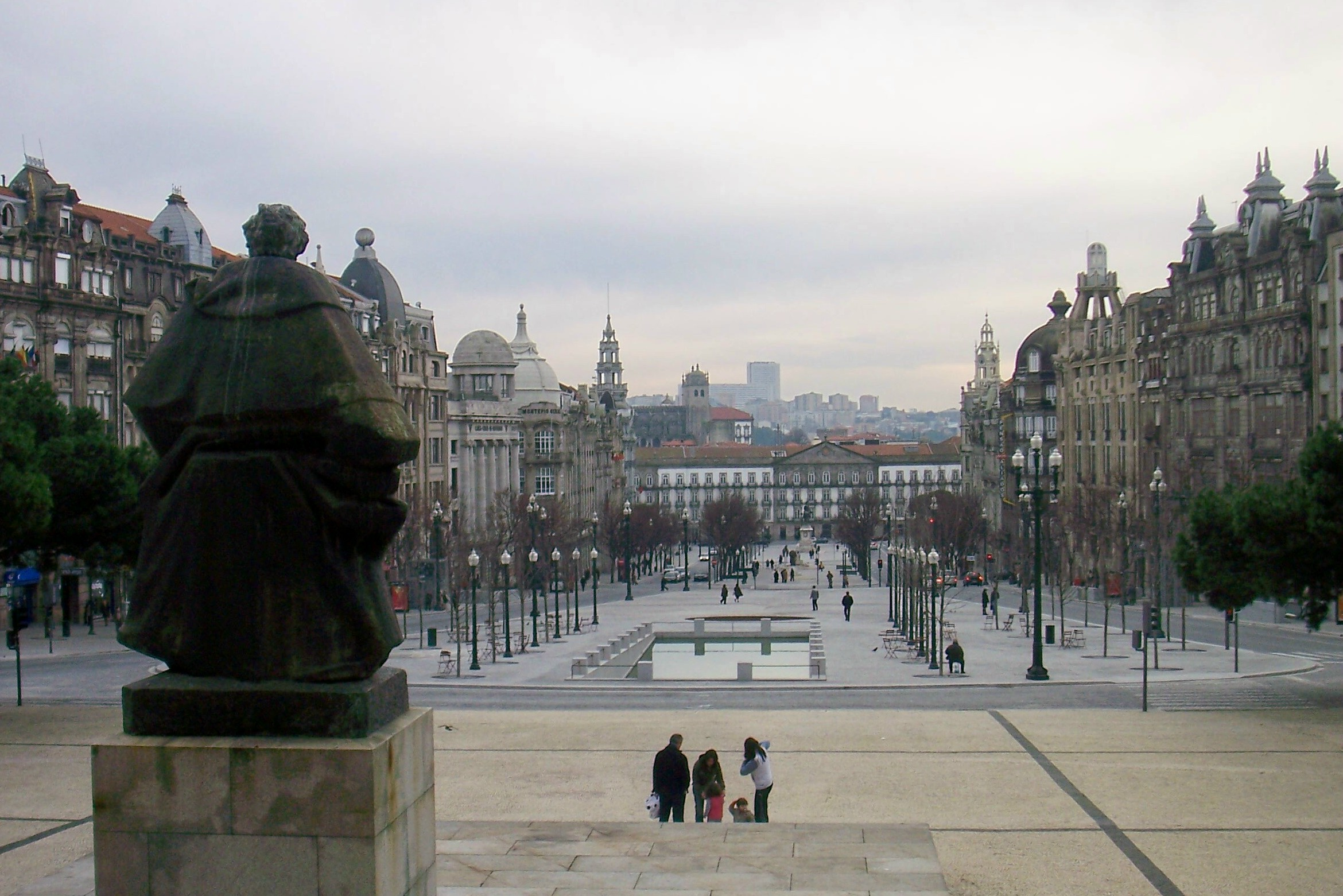 Porto